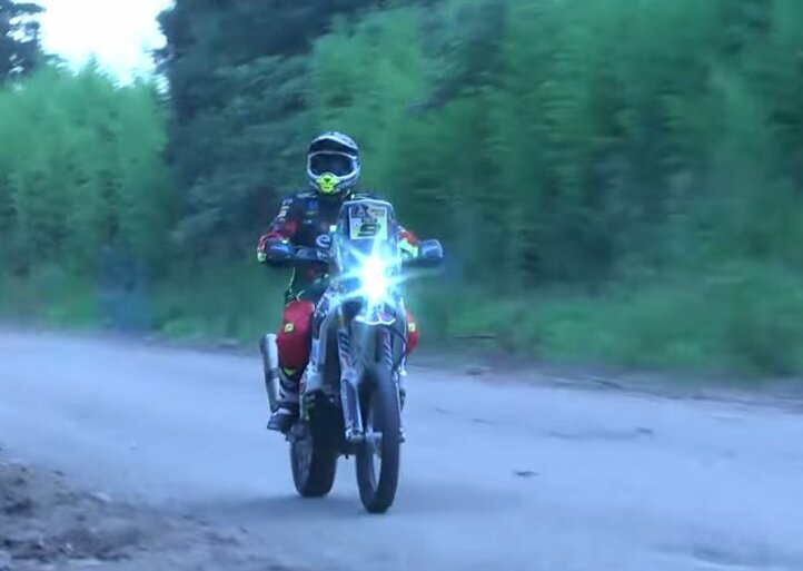 Dakar 2016. Etapa 3. Argentina. Tucumán. Puesto de Espectadores Paraje María Delia. Ricky Brabec.